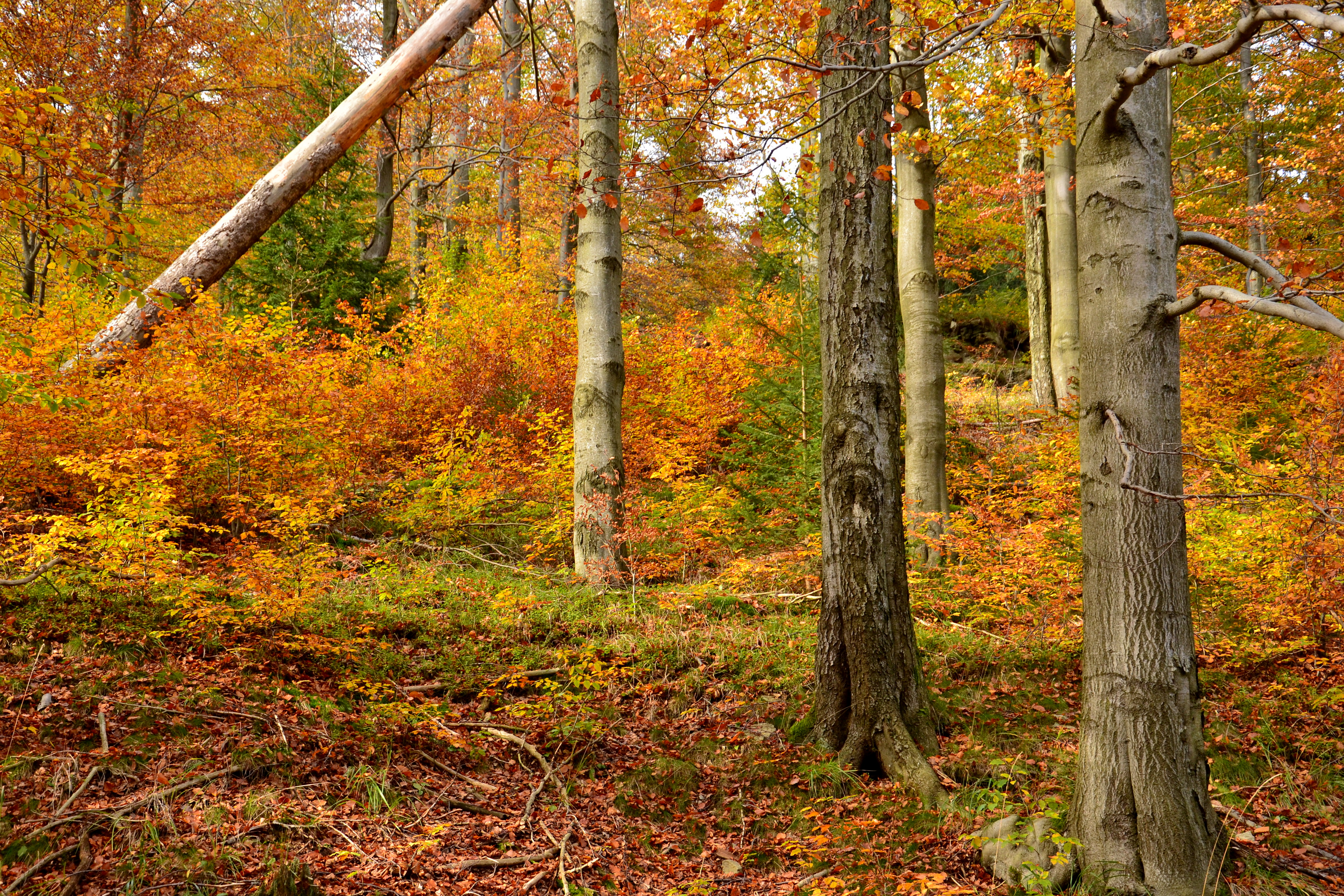 Přírodní rezervace Buky a javory v Gabrielce - padlý strom